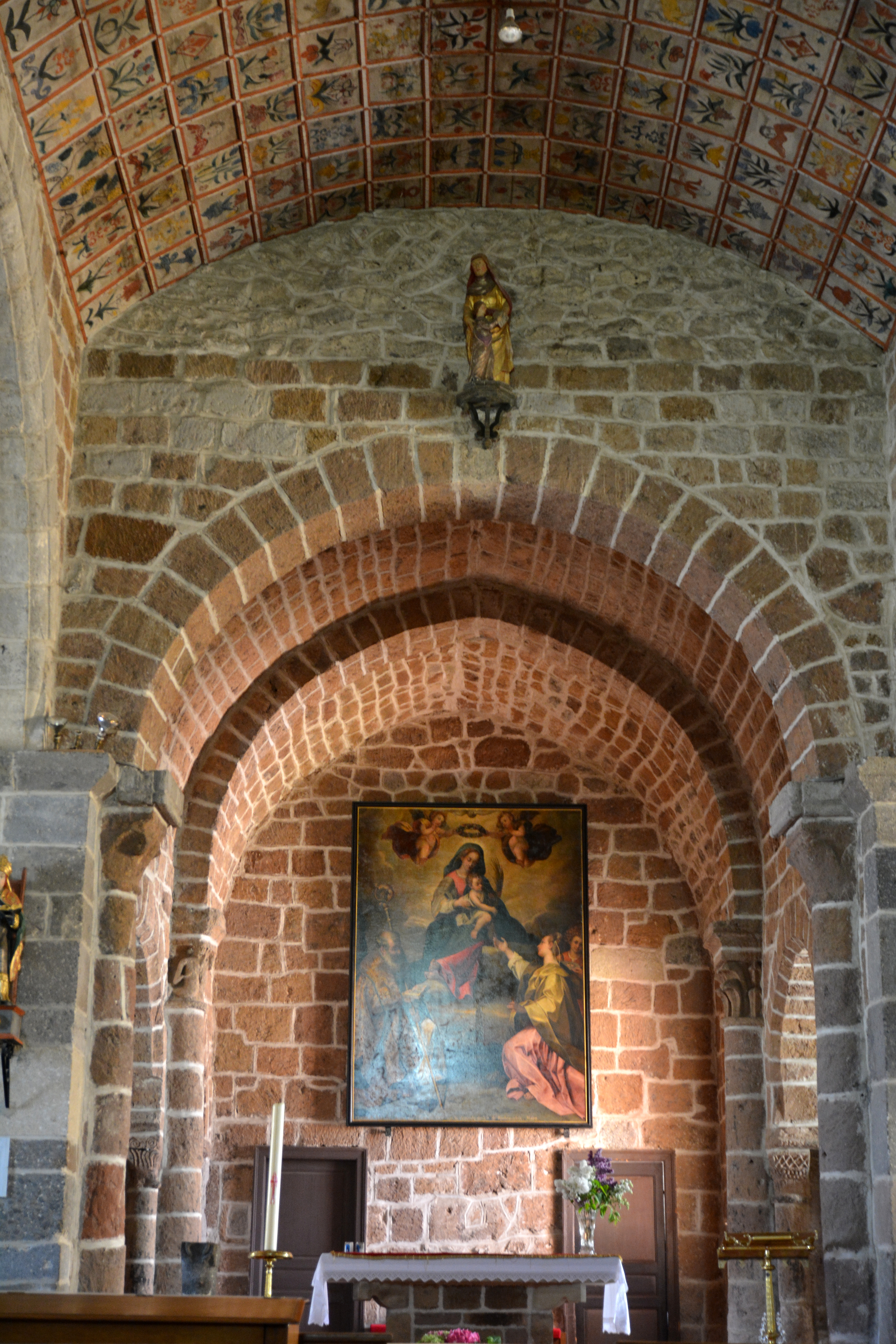 Vue intérieure Église Saint-Léger de Cheylade, Cantal, Auvergne, France